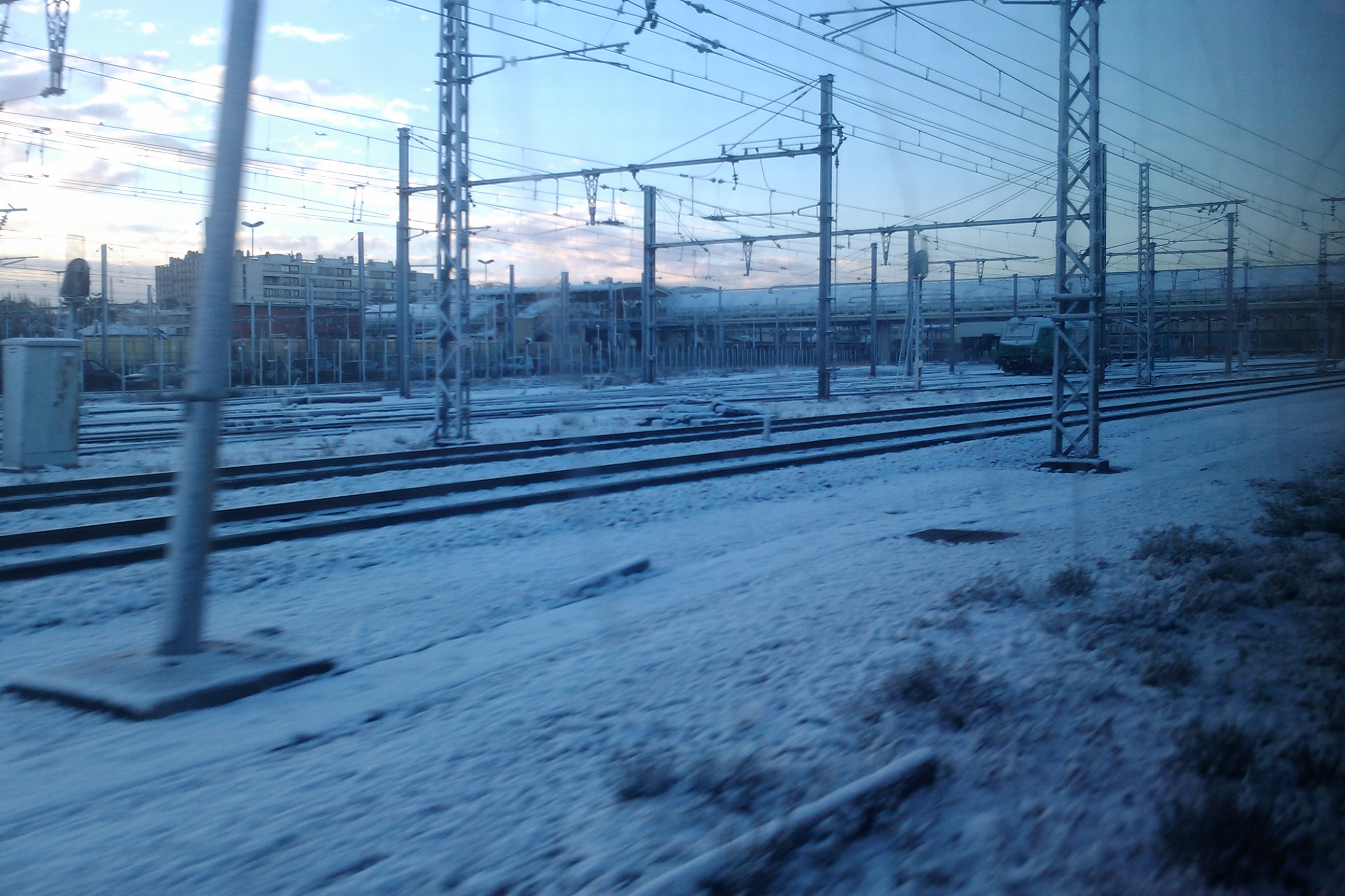 Massy Palaiseau, frozen